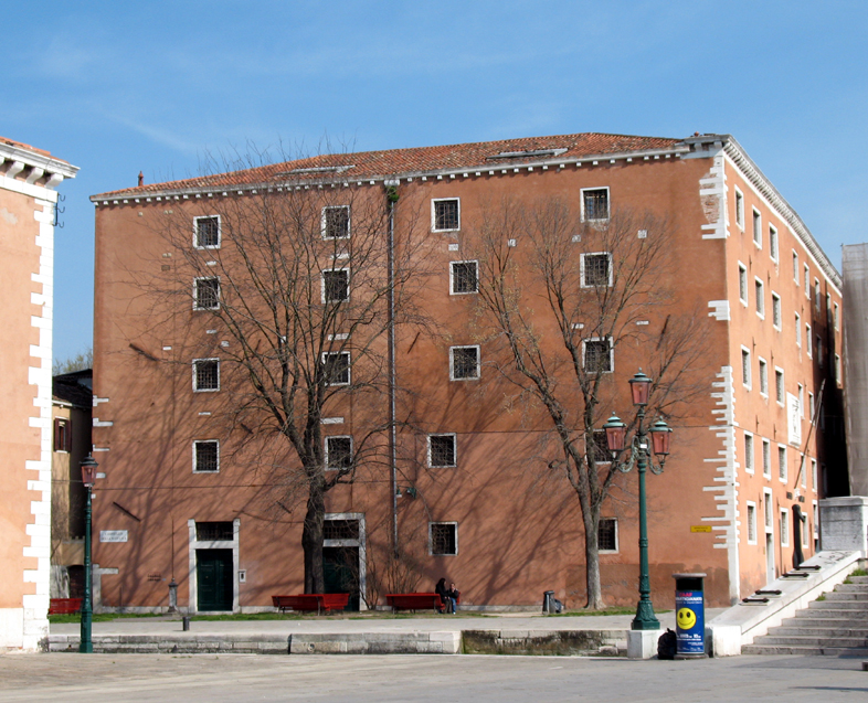 Venedig, Zwiebackspeicher am Arsenal, heute Schifffahrtsmuseum